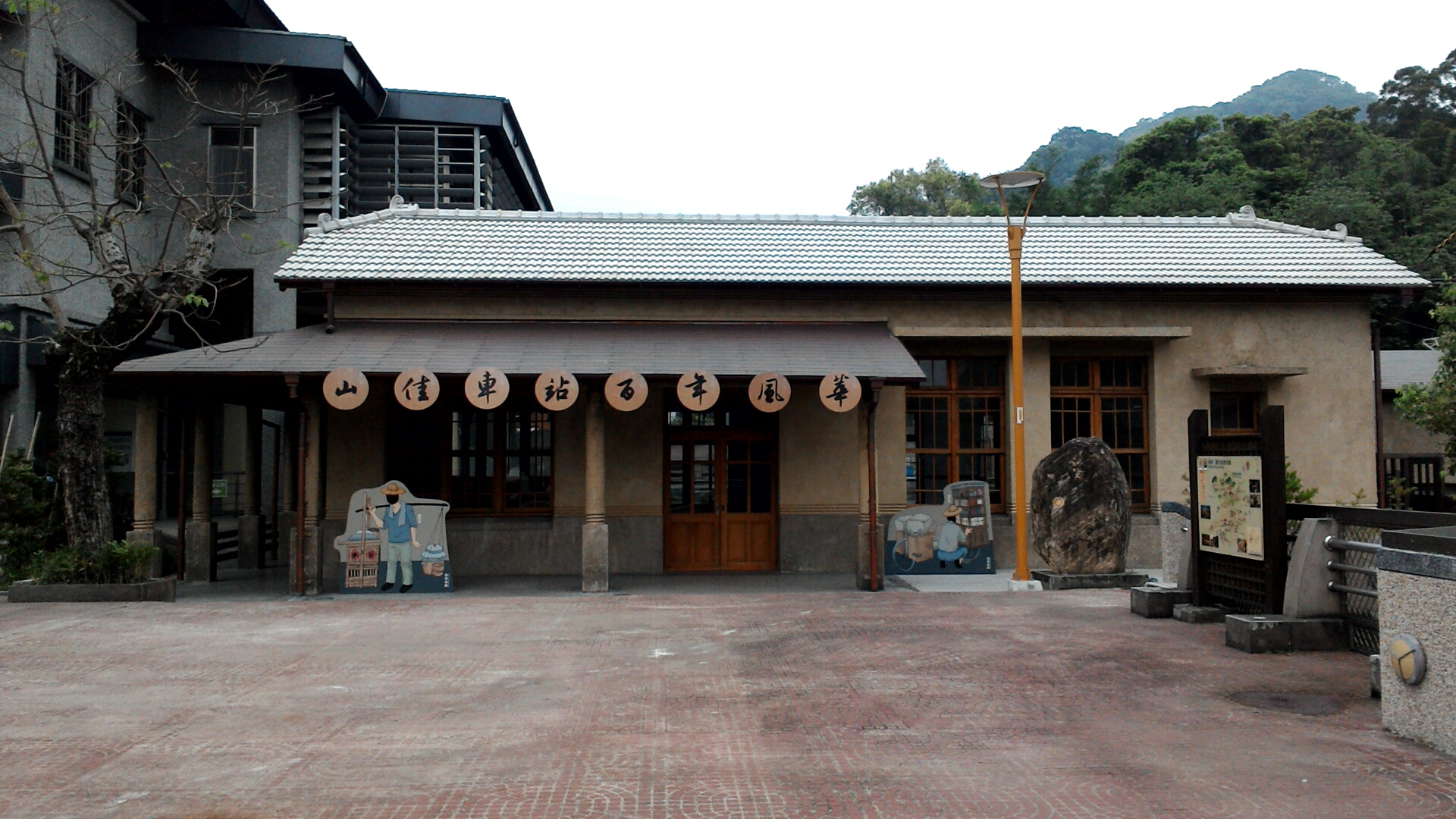 整修後的台鐵山佳車站舊站房,新北市樹林區中山里